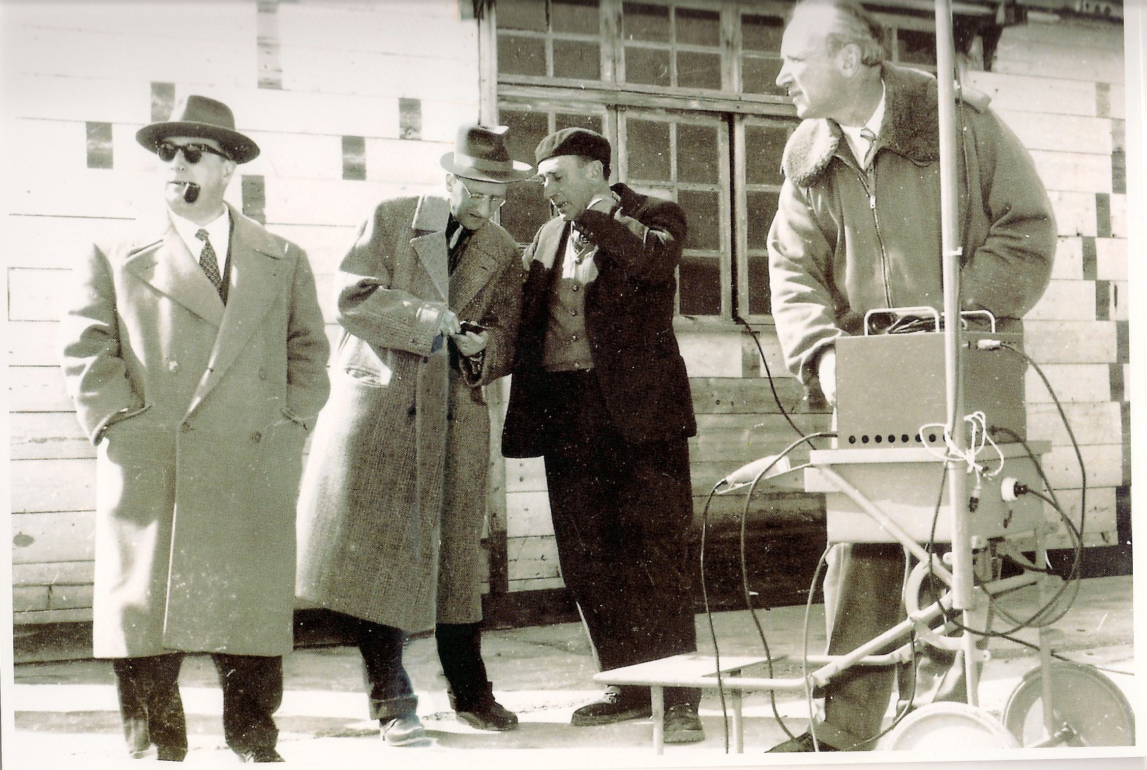 Nato a Reggio Emilia nel 1907, con i fratelli Dino e Tito, appartiene a una famiglia di artigiani che si è dedicata ad attività molto diverse come costruzione di orologi da campanile o produzione di parti fuse in lega metallica. Laureato presso il Politecnico di Torino nel 1928 , segue il corso di ingegneria aeronautica nel 1929 e partecipa alle attività del Laboratorio di aeronautica nel 1930 sempre presso il Politecnico. E’ assunto dalla Società Piaggio nel febbraio 1931, ove svolge la attività di progettista fino al 1975 collaborando con i più conosciuti progettisti del 1900 (Pegna, D’Ascanio, Casiraghi). Partecipa inizialmente ai vari progetti della Società, tra cui lo sviluppo del motore Piaggio PX1 RC100 installato sul velivolo Caproni Ca 162 bis, che raggiunge il primato del mondo di altitudine per velivoli a motore, ma la sua attività si svolge principalmente nella progettazione, sviluppo e omologazione dei velivoli costruiti dalla società Piaggio, dai biplani ai bombardieri, dai velivoli scuola agli executive a getto. In particolare alle dipendenze dell’ingegner Pegna segue la parte strutturale dei velivoli P6/ter, P10, P11, P12, P16, P23M, P32, P23R. Successivamente alle dipendenze dell’ingegner Casiraghi segue sempre la parte strutturale dei velivoli P50, P108, P111, P119. Dal 1947 come capo dell’ufficio tecnico segue la progettazione e sviluppo dei velivoli P136 (versioni F,L,L2), P148, P149 (versioni D,E,U), P150, P166 (versioni M,B,C,S) e PD808 (versioni executive e GE).